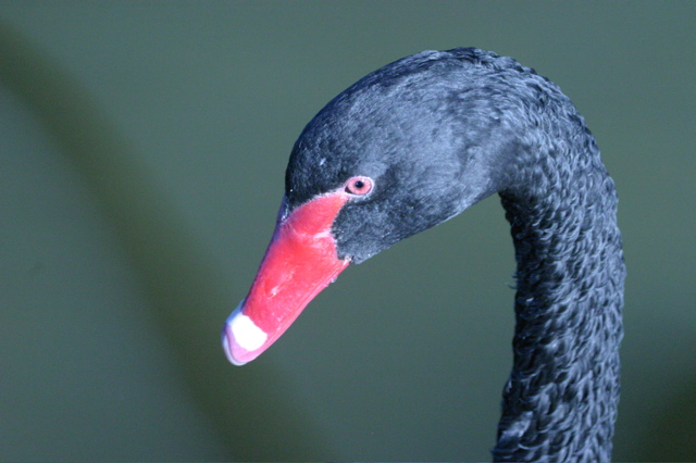 Object: black swan, Trauerschwan , C. atratus Source: self Photographer: Nils Fretwurst Date: December 2003